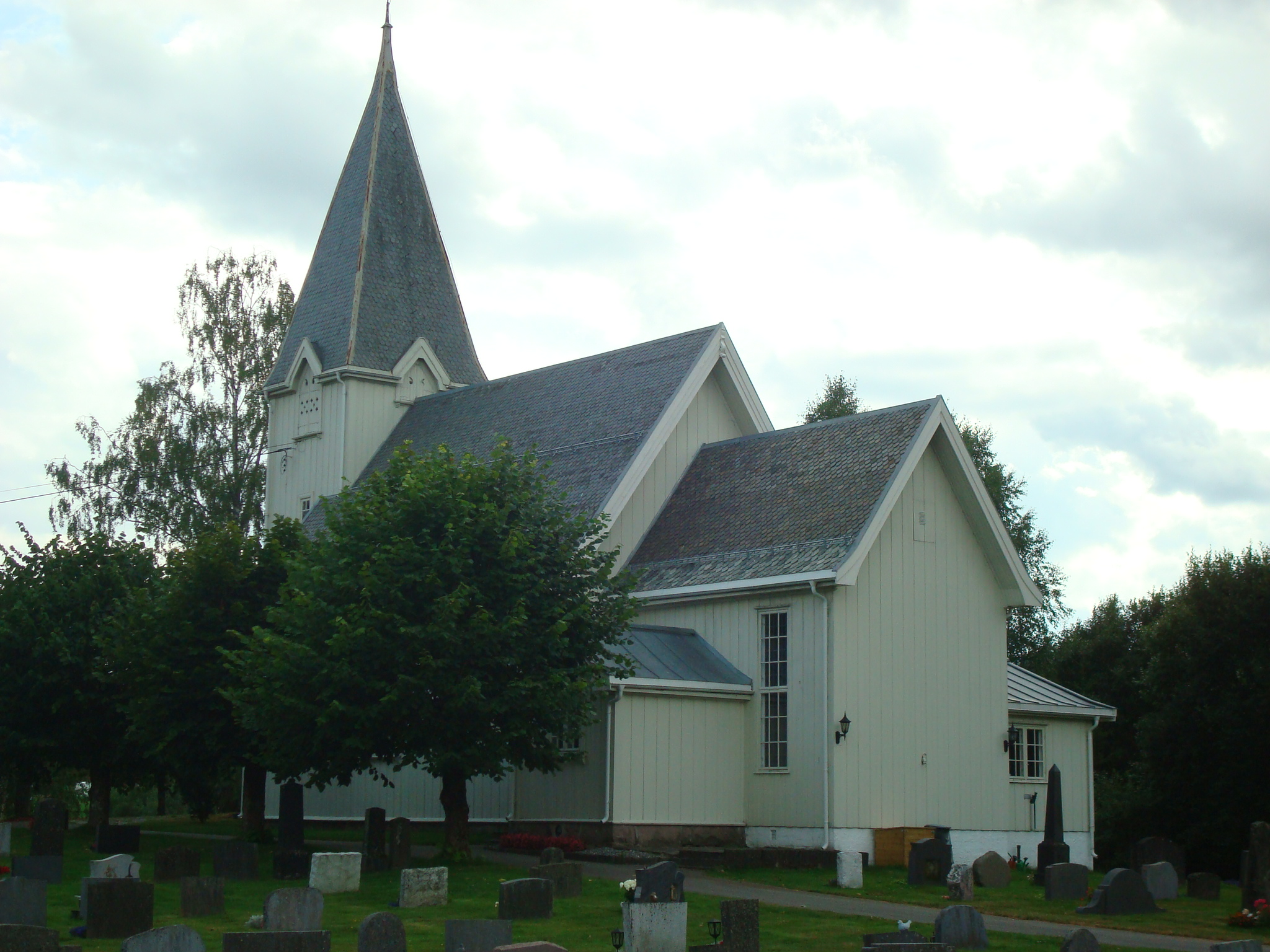 Mogreina kirke.